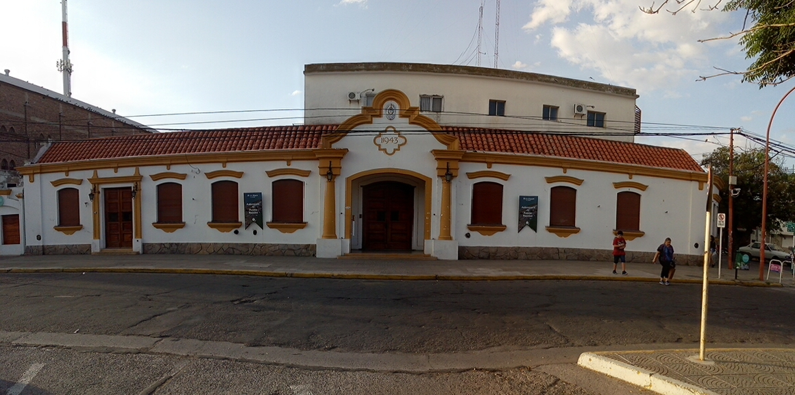 Palacio municipal de Coronel Rosales, ubicado en la ciudad cabecera del partido, Punta Alta.